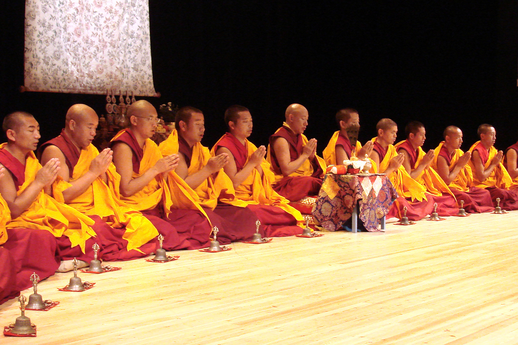 Cérémonie des moines tibétains du monastère de Nechung Dharamsala